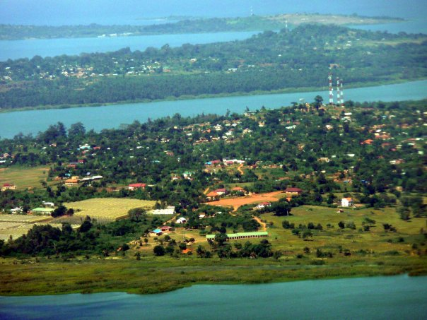 Presqu'île d'Entebbe vue du ciel à l'approche de l'aéroport international